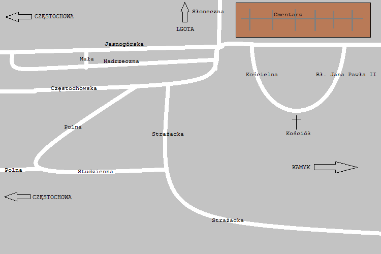 Mapa wioski Biała (woj. śląskie, pow. kłobucki, gm. kłobuck)